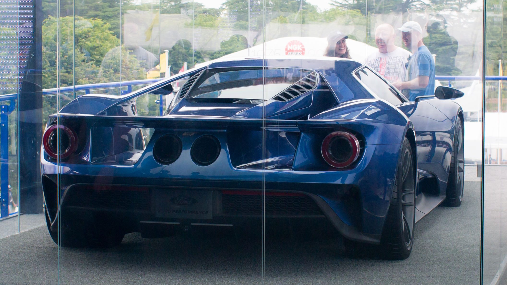 2016 Ford GT